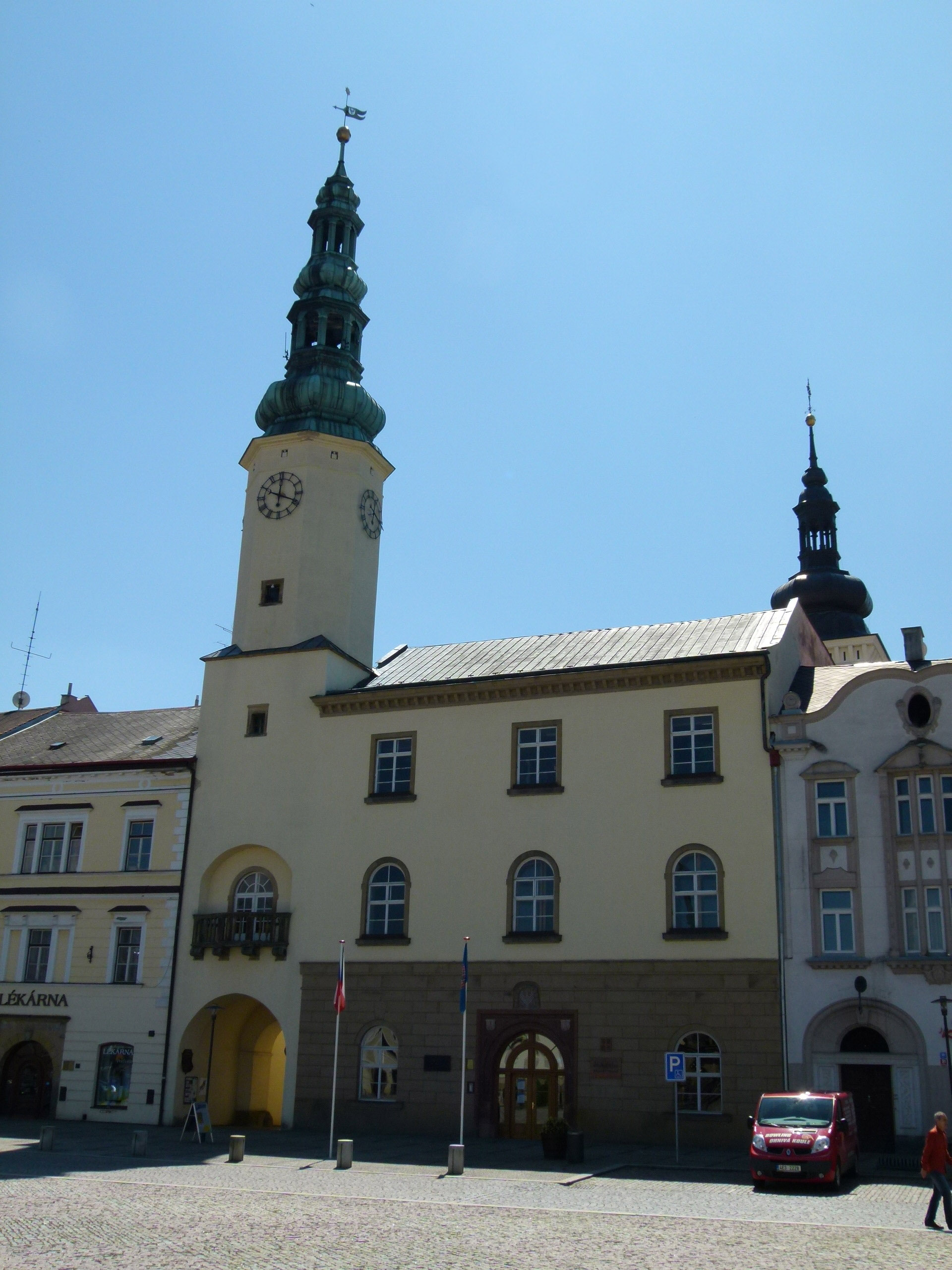 Radnice (Moravská Třebová), nám. T. G. Masaryka 32/29, Moravská Třebová